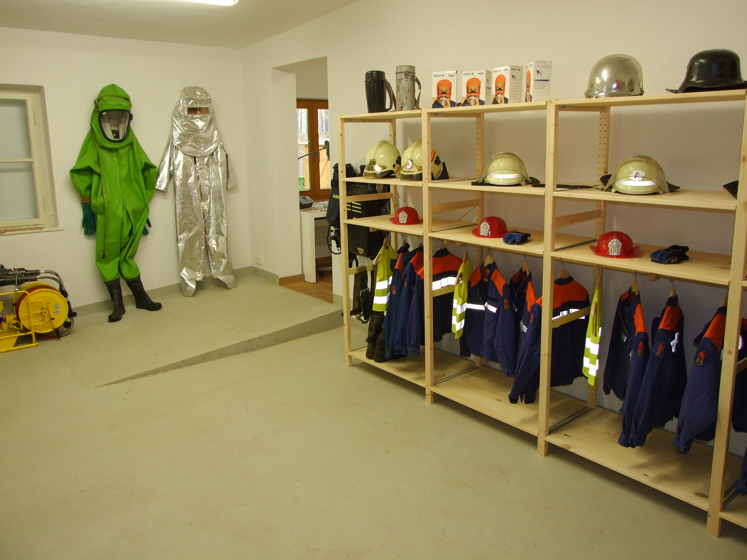 Innenansicht Kinderfeuerwache im Floriansdorf KiEZ Frauensee